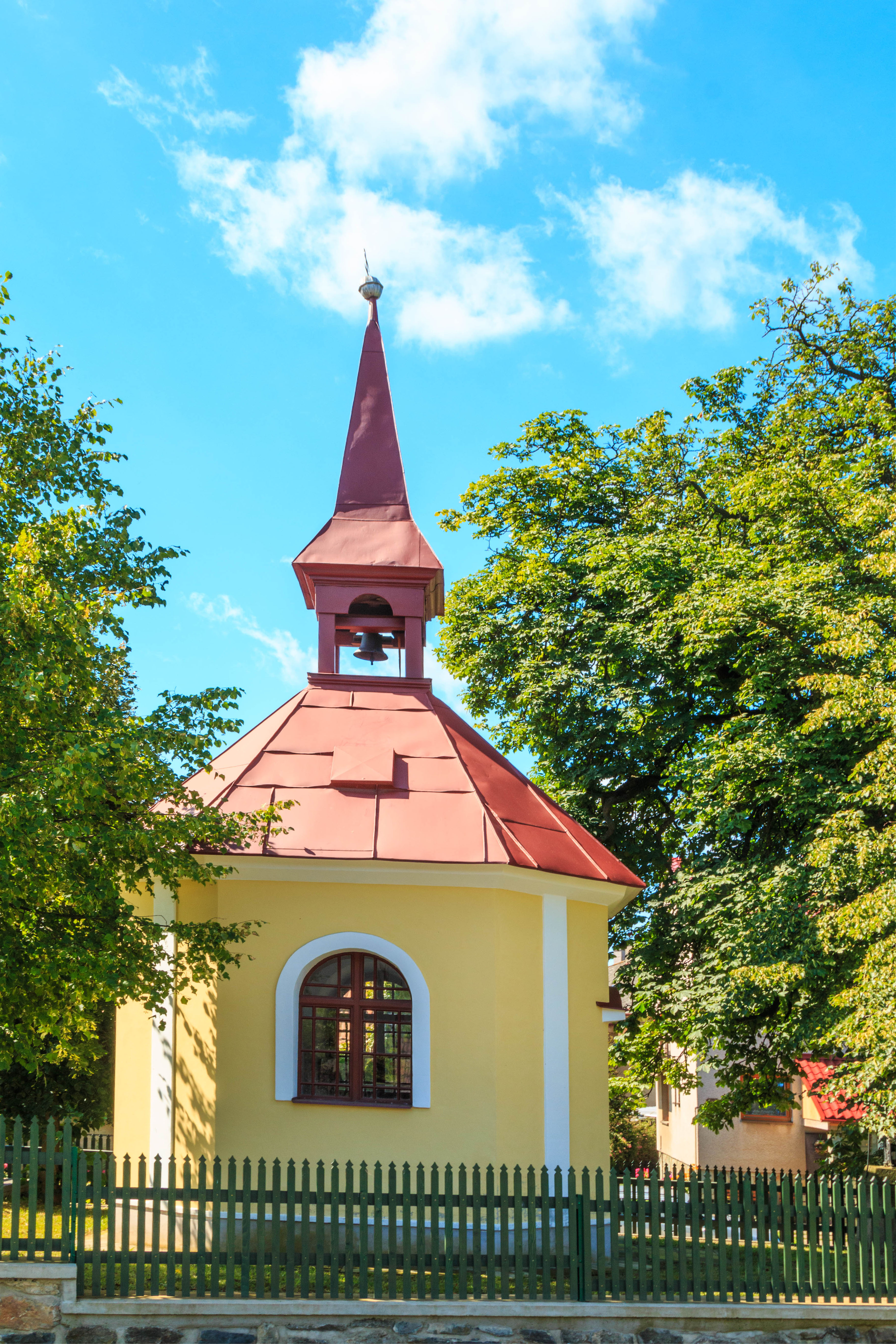 Kaple svatého Floriána, Olešná (okres Havlíčkův Brod).